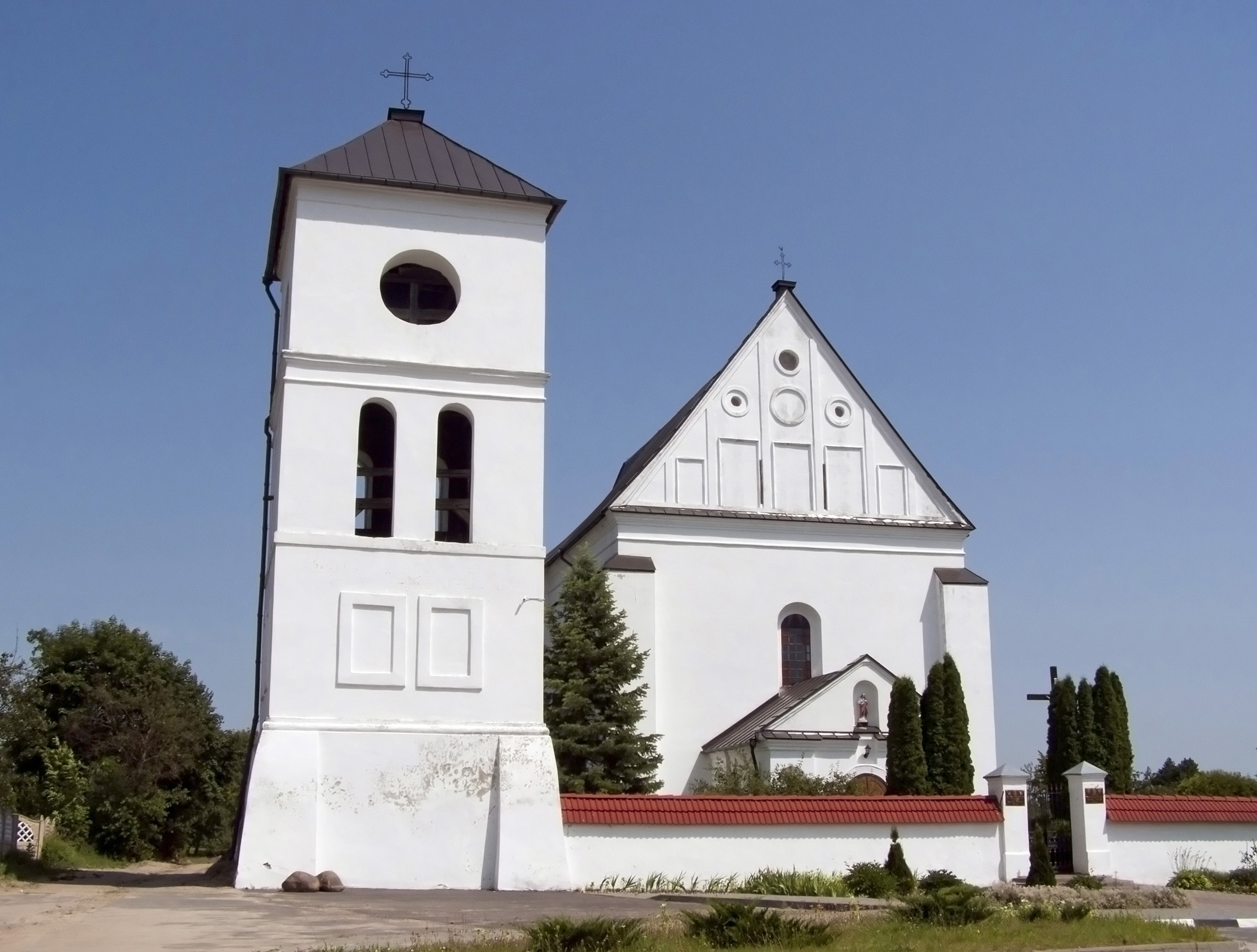 Беларуская (тарашкевіца): Троіцкі касьцёл са званіцай. в. Чарнаўчыцы This is a photo of Belarusian heritage monument. Reference number: 112Г000122 ( WLM)